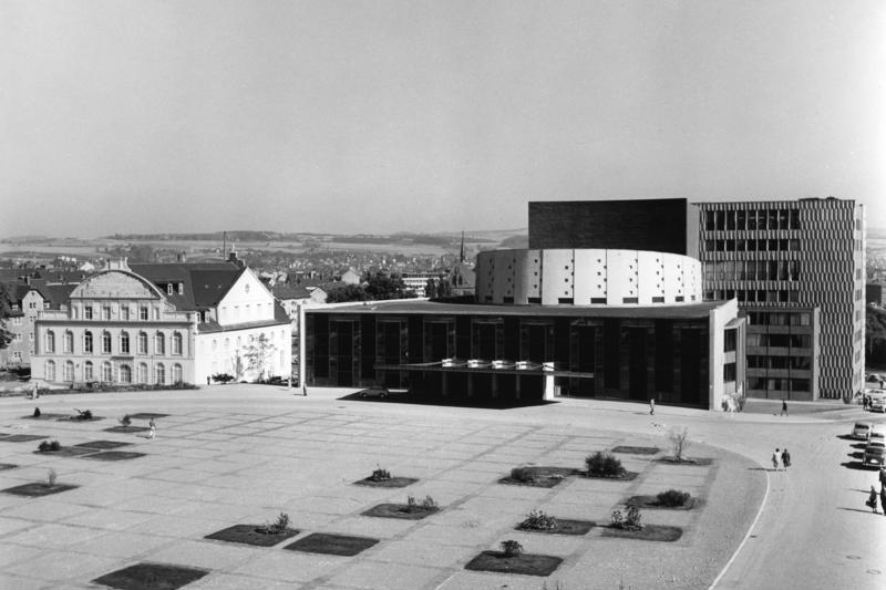 1.10.1959 Kassel das neue Staatstheater